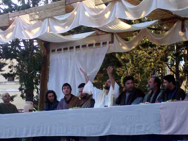 Desciption: Passione di Cristo (Lizzano (TA)) Photographer: --Asia Date: 9.4.2006